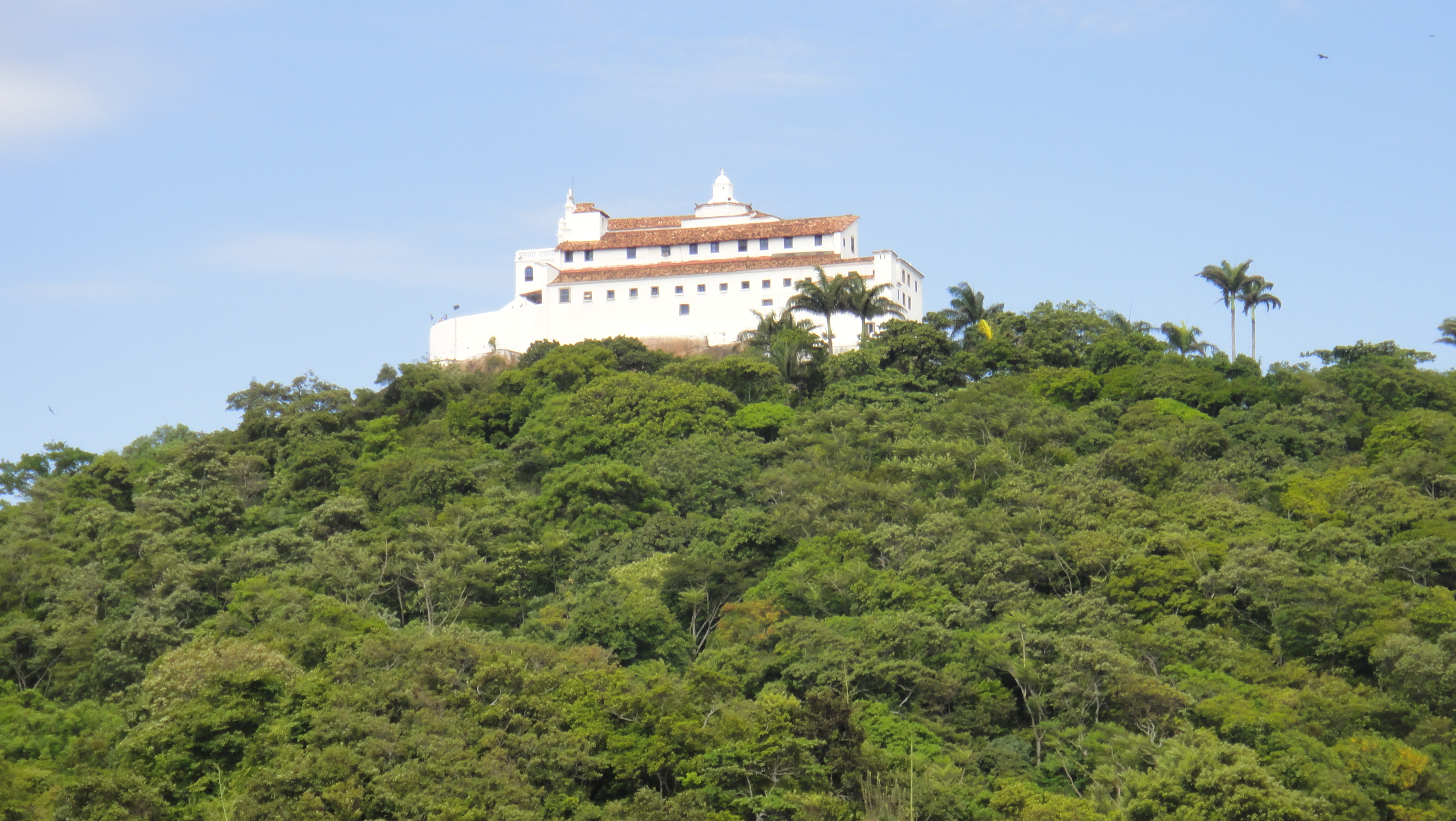 Convento e Igreja de Nossa Senhora da Penha